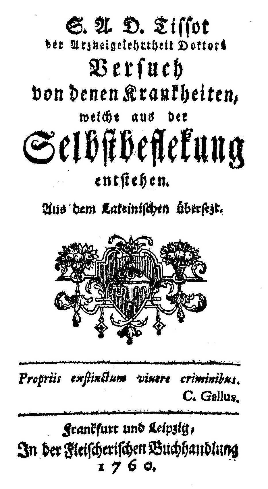 Titelblatt des Werkes Versuch von denen Krankheiten, welche aus der Selbstbefleckung entstehen, beschnittene Version des Original-Scans von Joergens.mi